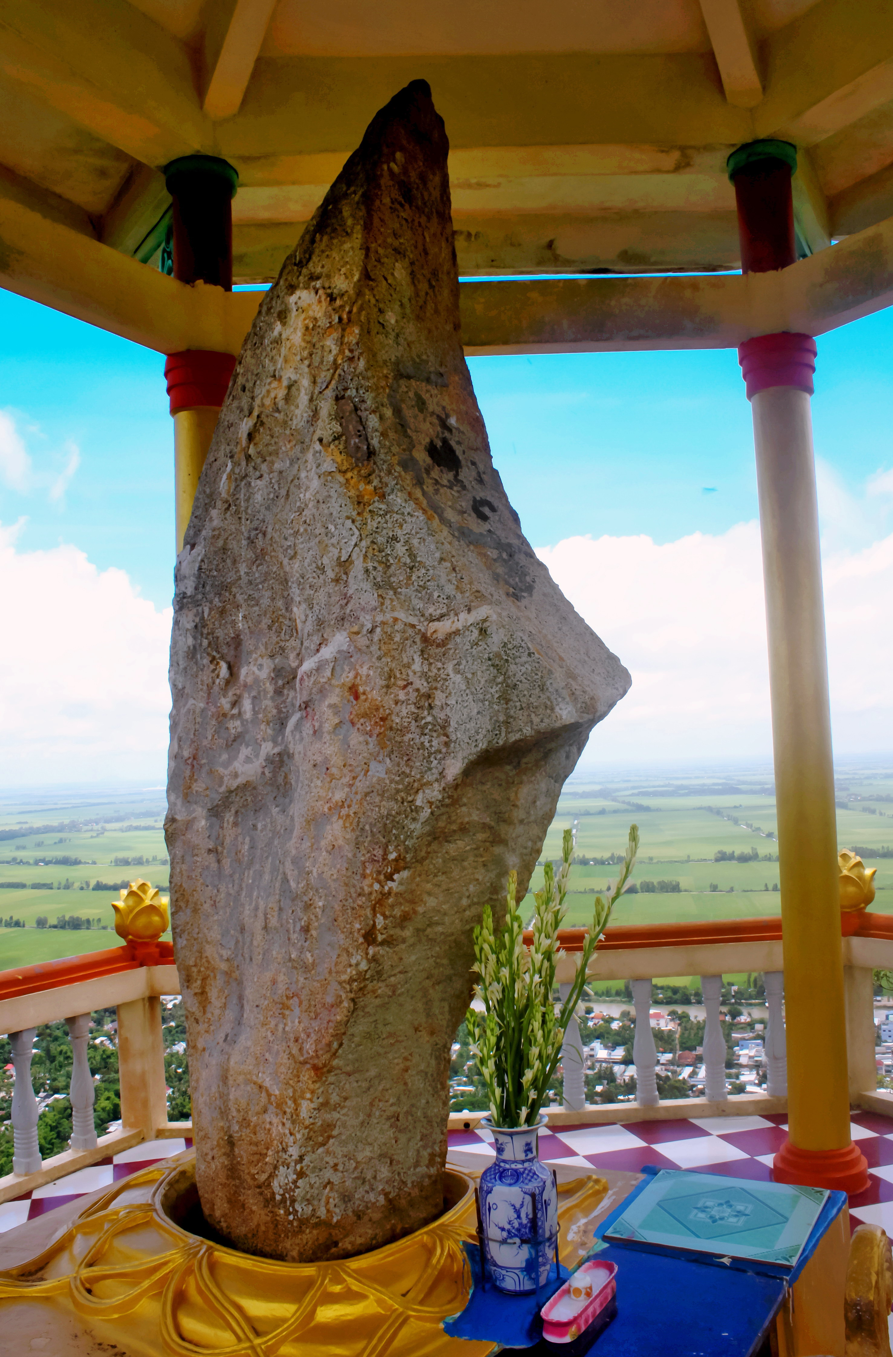 Người dân địa phương kể lại rằng, sau một trận cuồng phong, sấm sét đã làm vỡ một tảng đá lớn làm lộ ra một hình thanh đao trên đỉnh phía Bắc của núi Ba Thê (An Giang, Việt Nam). Sau đó, người ta gọi tên là Thạch đại đao, và lập tiểu đình để bảo quản.